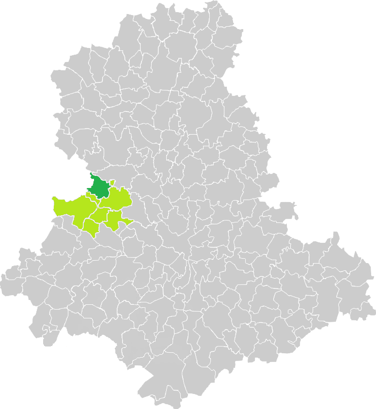 Carte de situation de la commune de Javerdat (en vert foncé) dans le votre Canton (en vert clair) sur une carte des communes de la Haute-Vienne